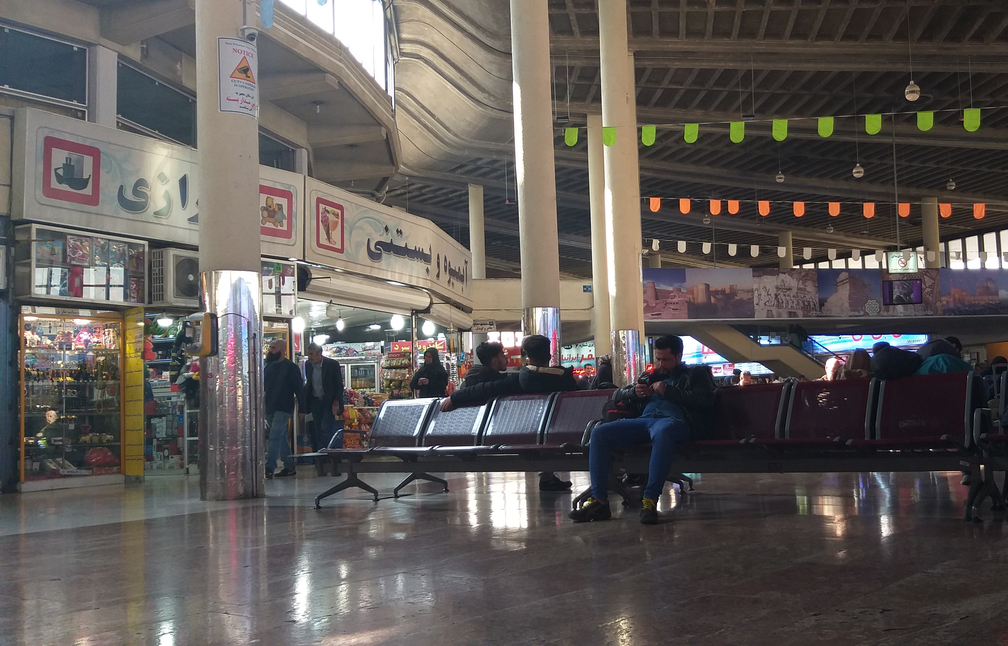 ترمینال جنوب تهران